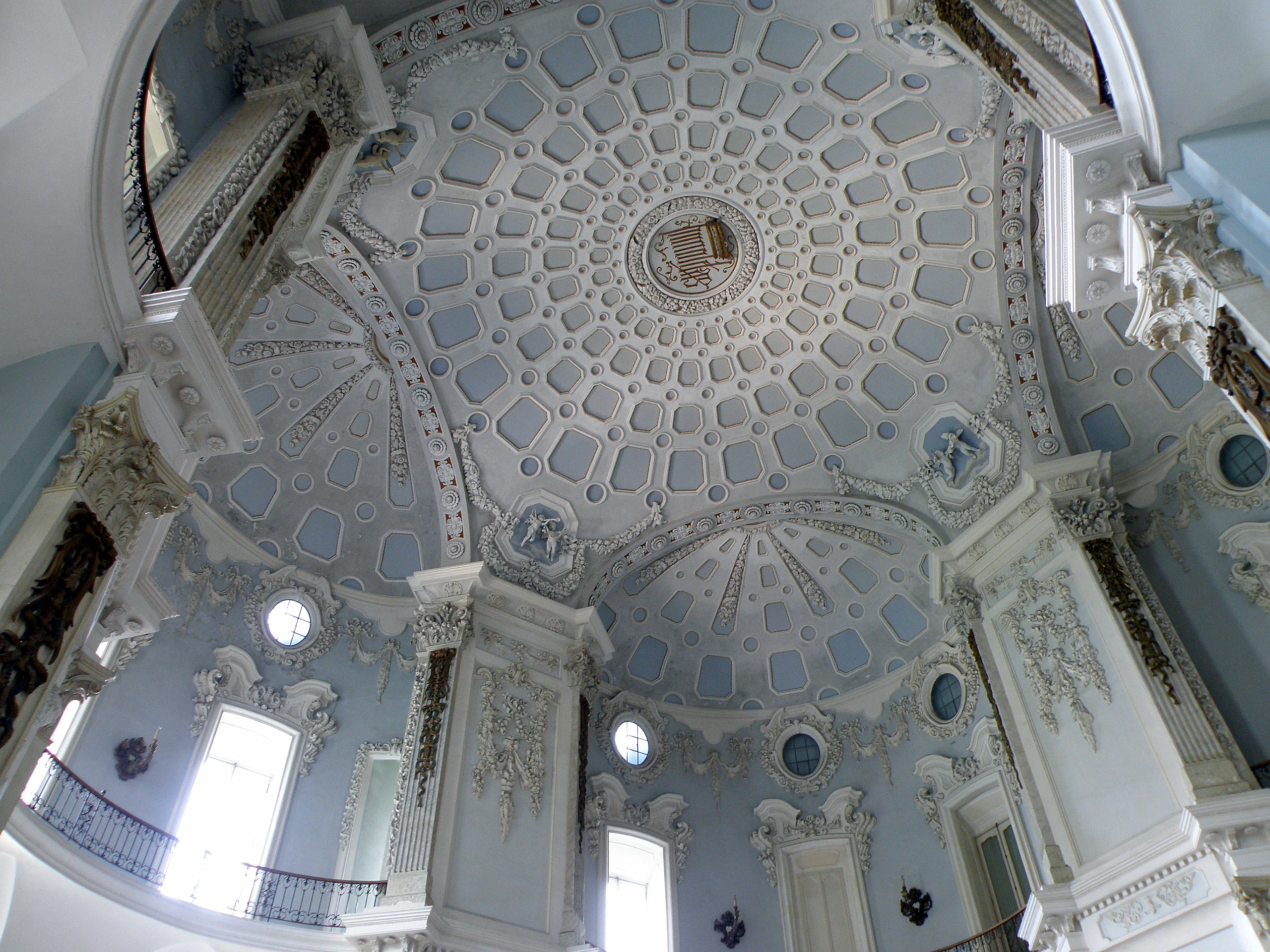 Isola Bella, Stresa (VB), une des îles Borromées, dans le lac Majeur. Palais Borromée, plafond de la salle de bal.